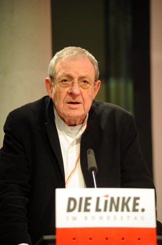 Prof. Dr. Werner Ruf warf im Eröffnungspodium die Frage nach den hintergründigen Ursachen des Krieges auf und verwies auf die geostrategische Lage des zentralasiatischen Afghanistan. Vier mächtige Nachbarn Afghanistans seien Atomwaffenstaaten. Für den Westen, aber auch für China und Indien spiele Energiesicherung und die Absicherung der Transportwege die zentrale Rolle. Die Abhängigkeit von Pipelines, die über russisches Gebiet führen, solle überwunden werden. Auch Deutschland wolle mitmischen: »Nur wer mit schießt, darf hinterher mit verhandeln.« Vor diesem Hintergrund sei auch die Umwandlung der Bundeswehr von einer Wehrpflichtigenarmee in eine Armee im Dauereinsatz zu verstehen.